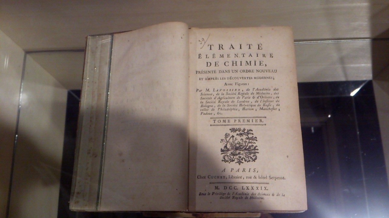 化学要論。This book was written by Antoine Lavoisier in 1789.